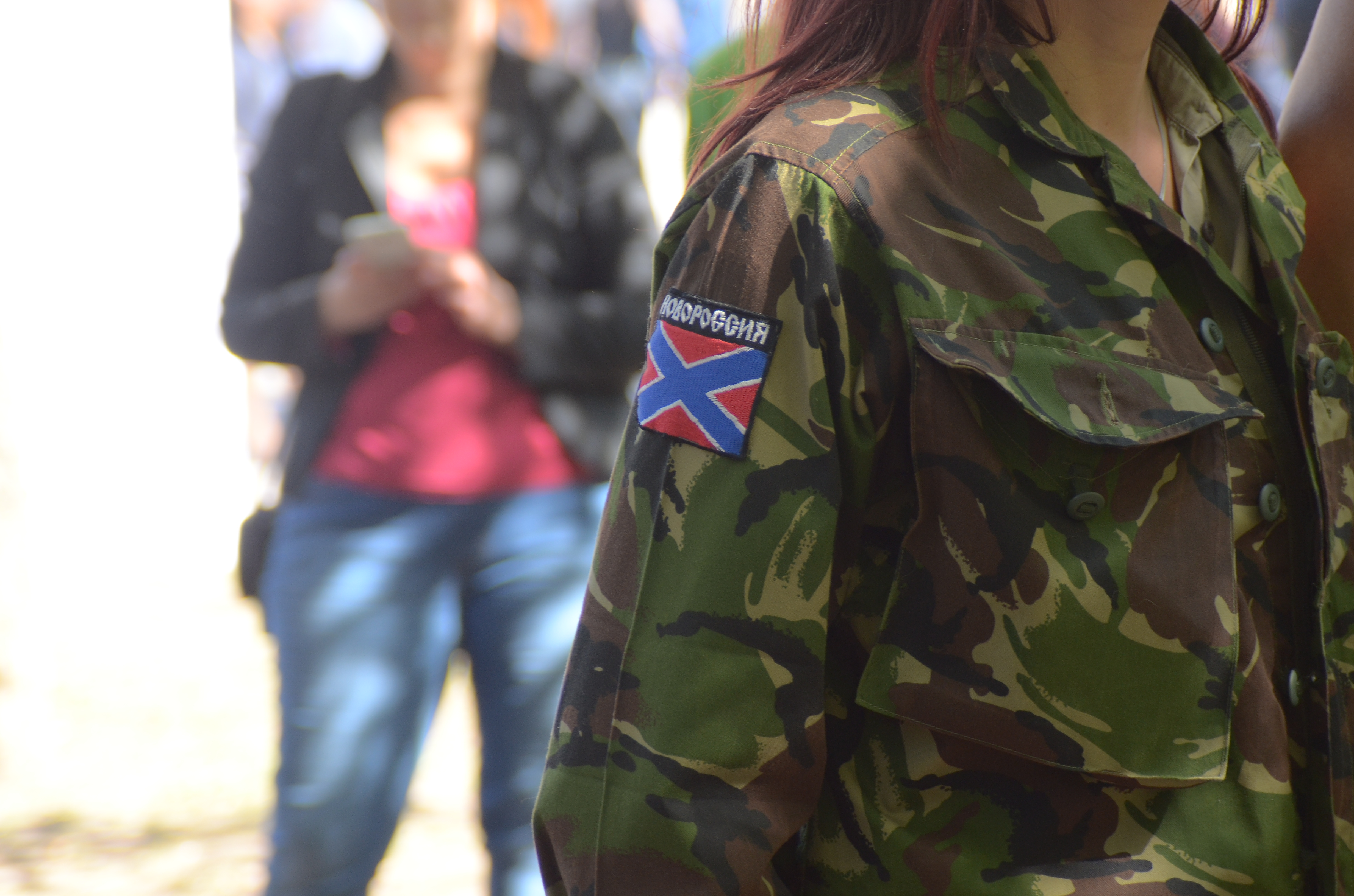 Кузнечный фестиваль в Донецке